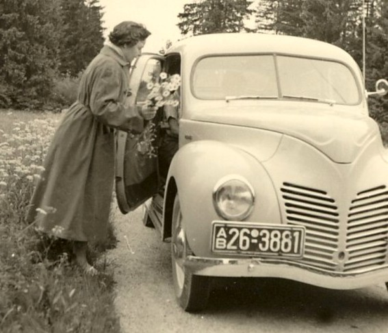 Unser Buckeltaunus von 1952, sandfarben